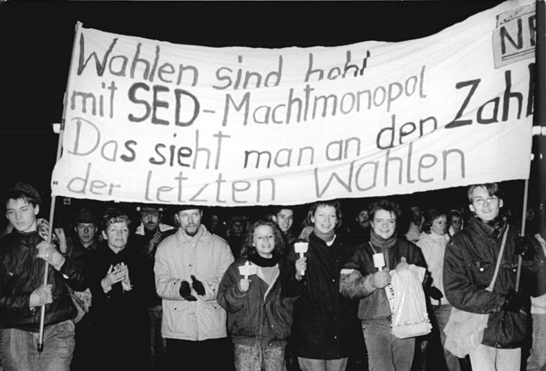 Dresden, Montagsdemonstration ADN-ZB Hiekel 20.11.89 Dresden: Demonstration Zehntausende forderten auf einer Demonstration und einer anschließenden Kundgebung am Fucikplatz die Änderung des Verfassungsartikls 1, Rechtssicherheit und die Bestrafung der Schuldigen an der Krise. Information added by Wikimedia users.